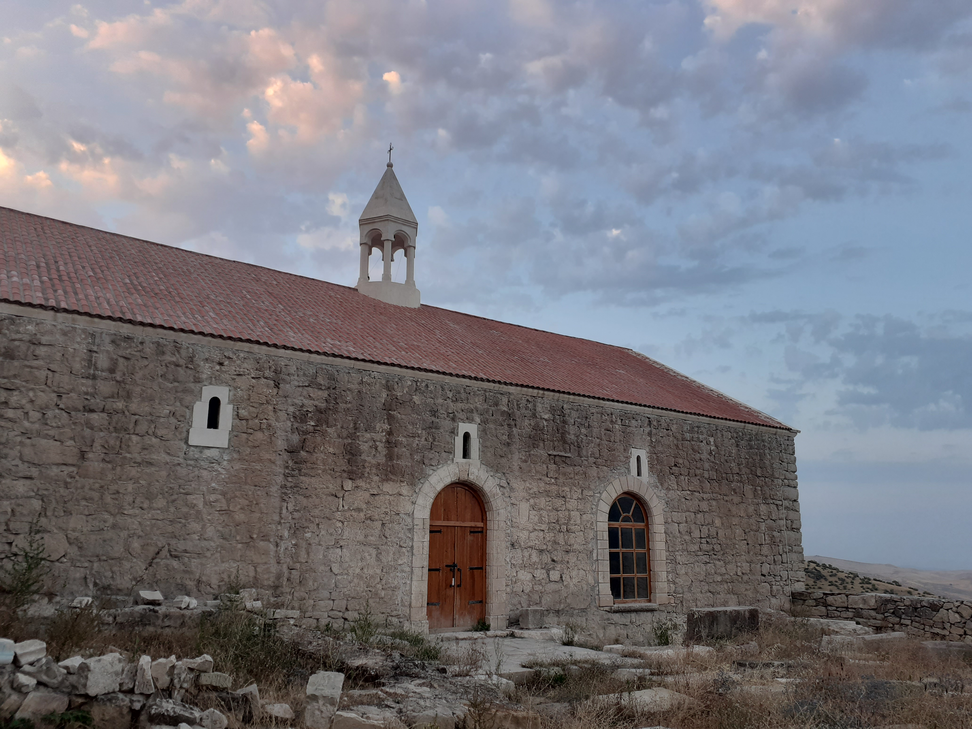 Ս.Հովհաննես եկեղեցի